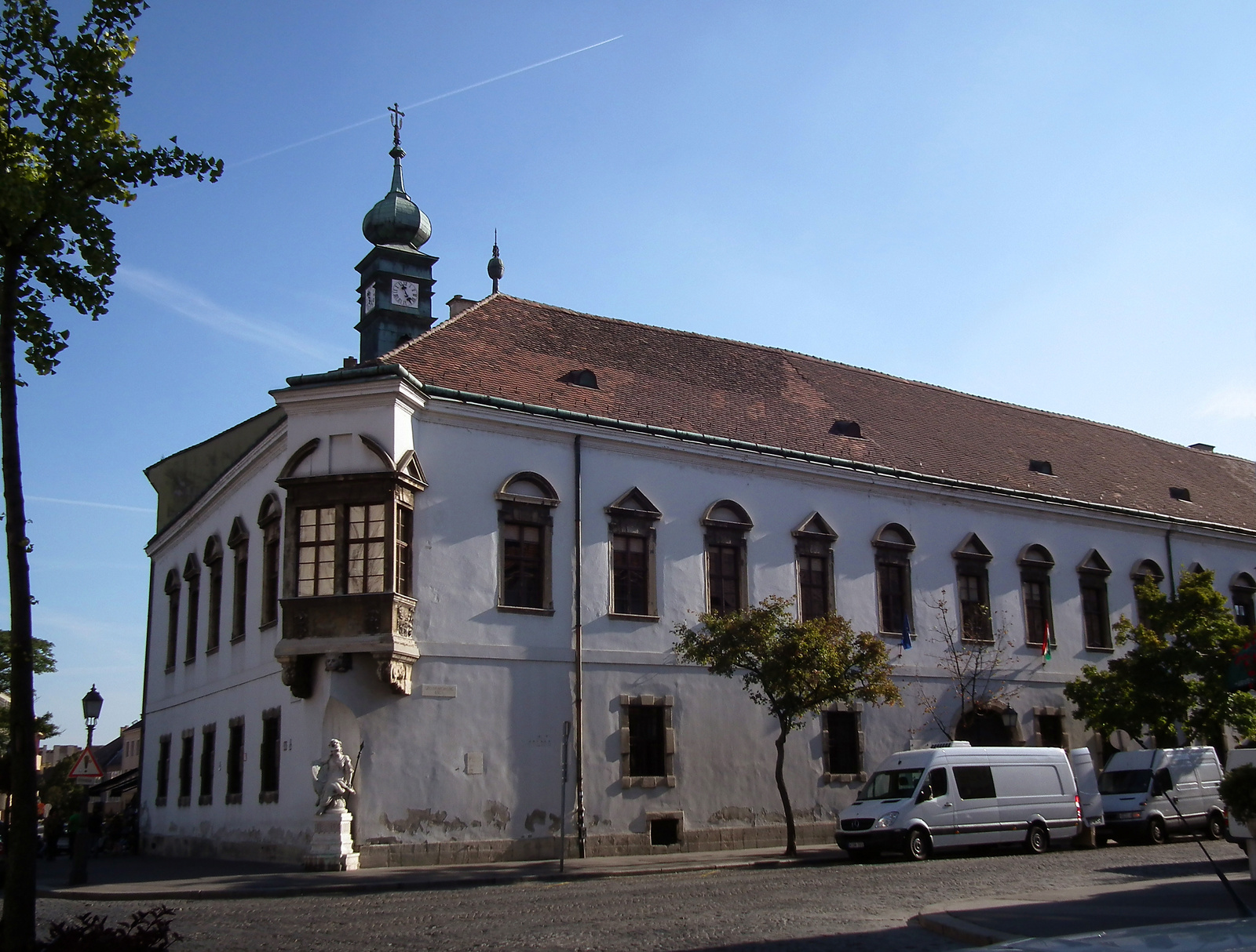 Régi budai városháza (Budapest 1, Szentháromság tér 2., Tárnok utca 28., Úri utca 21.)